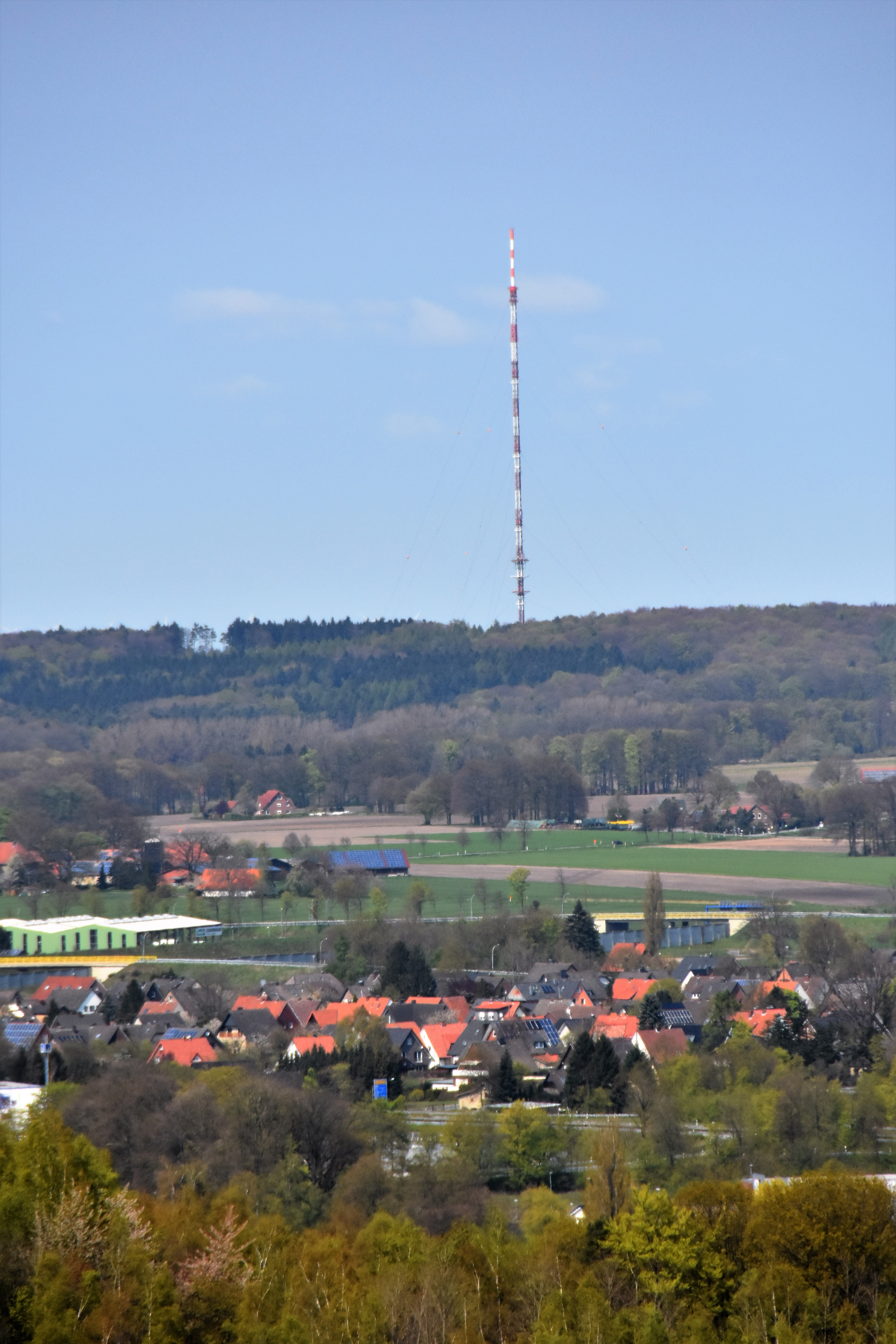 Blick vom Piesberg zur Schlepptruper Egge mit dem NDR Sendemast